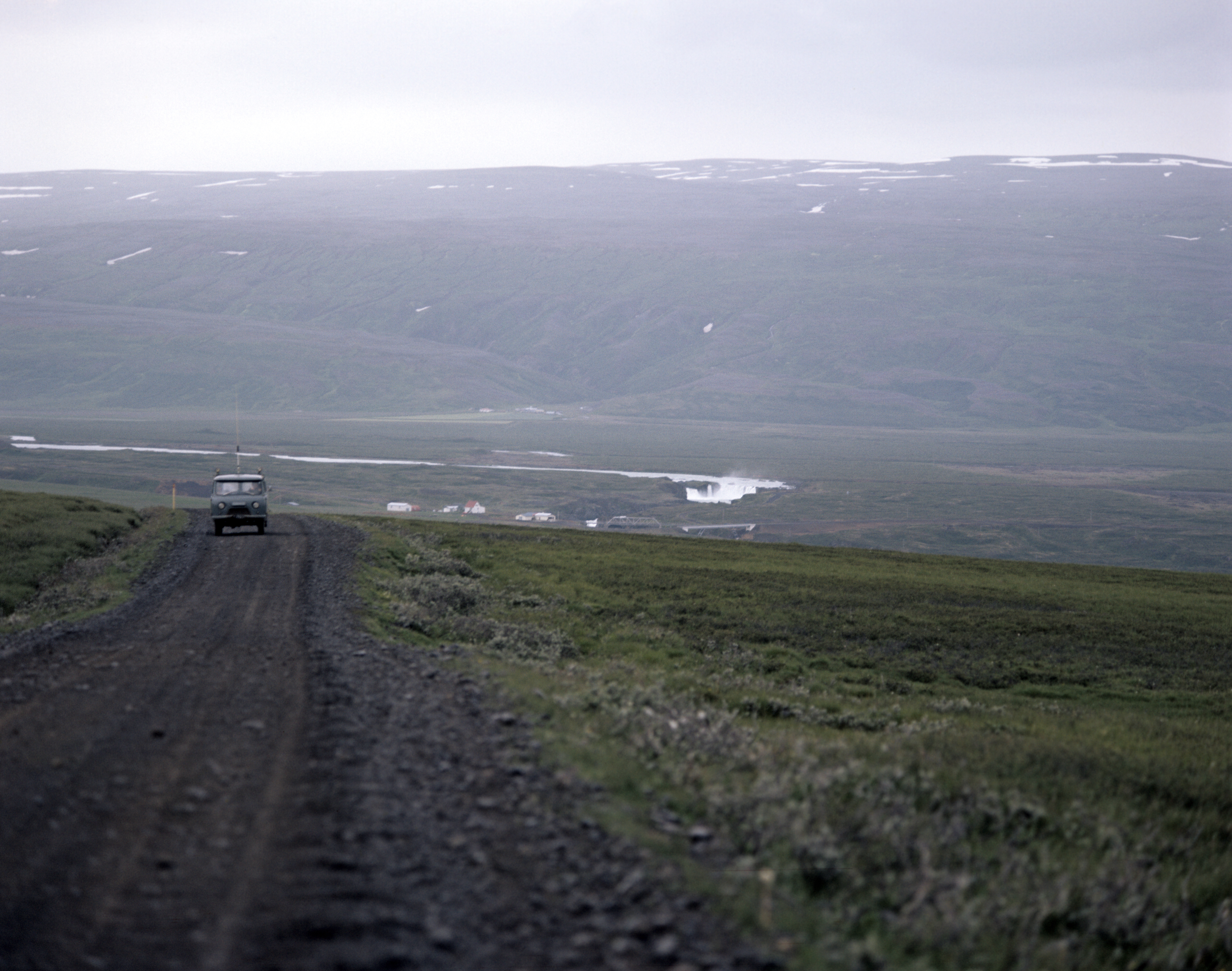 Bárðardalur mit Goðafoss.